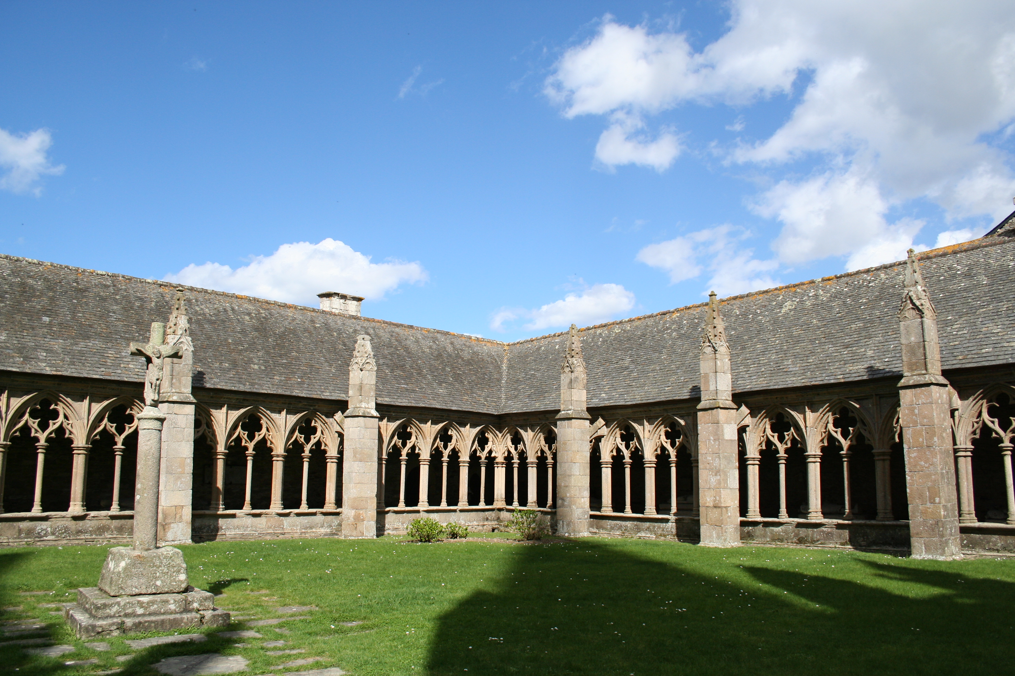 Cathédrale Saint-Tugdual de Tréguier - Tréguier - Côtes d'Armor - France. Ailes nord et est du cloître. .